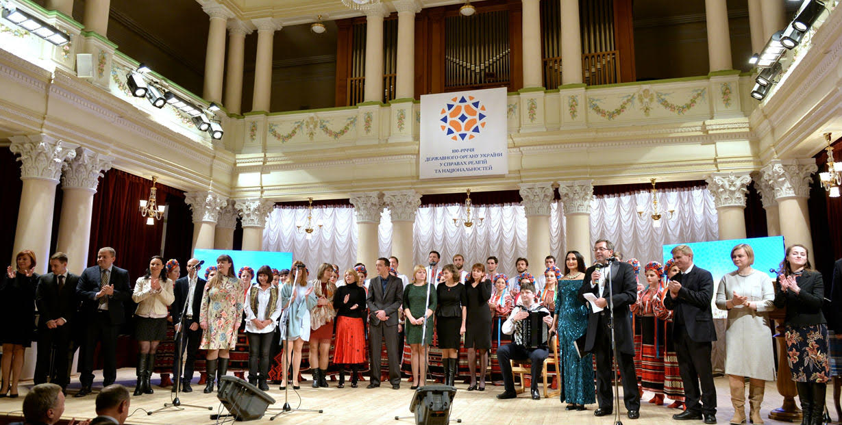 Відзначення 100-річчя з часу заснування Державного органу України у справах релігій та національностей у Колонній залі Національної філармонії України у Києві